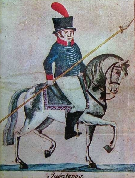 Uniforme del batallón de Quinteros